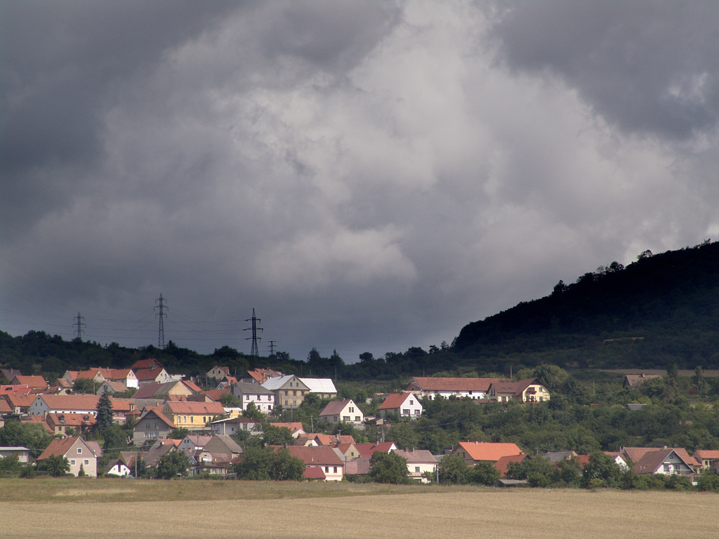 Vesnice Pohořany (část obce Žitenice, okres Litoměřice) při jižním okraji Českého středohoří. Vpravo v pozadí vrch Liščín.